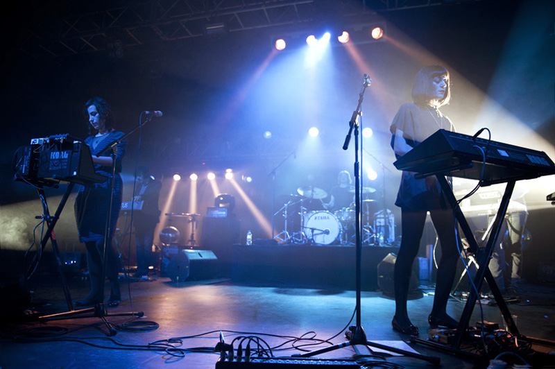 ladytron | hmv forum